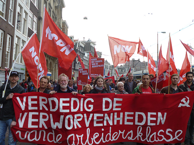 Blok van de NCPN op de Dag van de Arbeid demonstratie, 1 mei 2014, in Amsterdam.